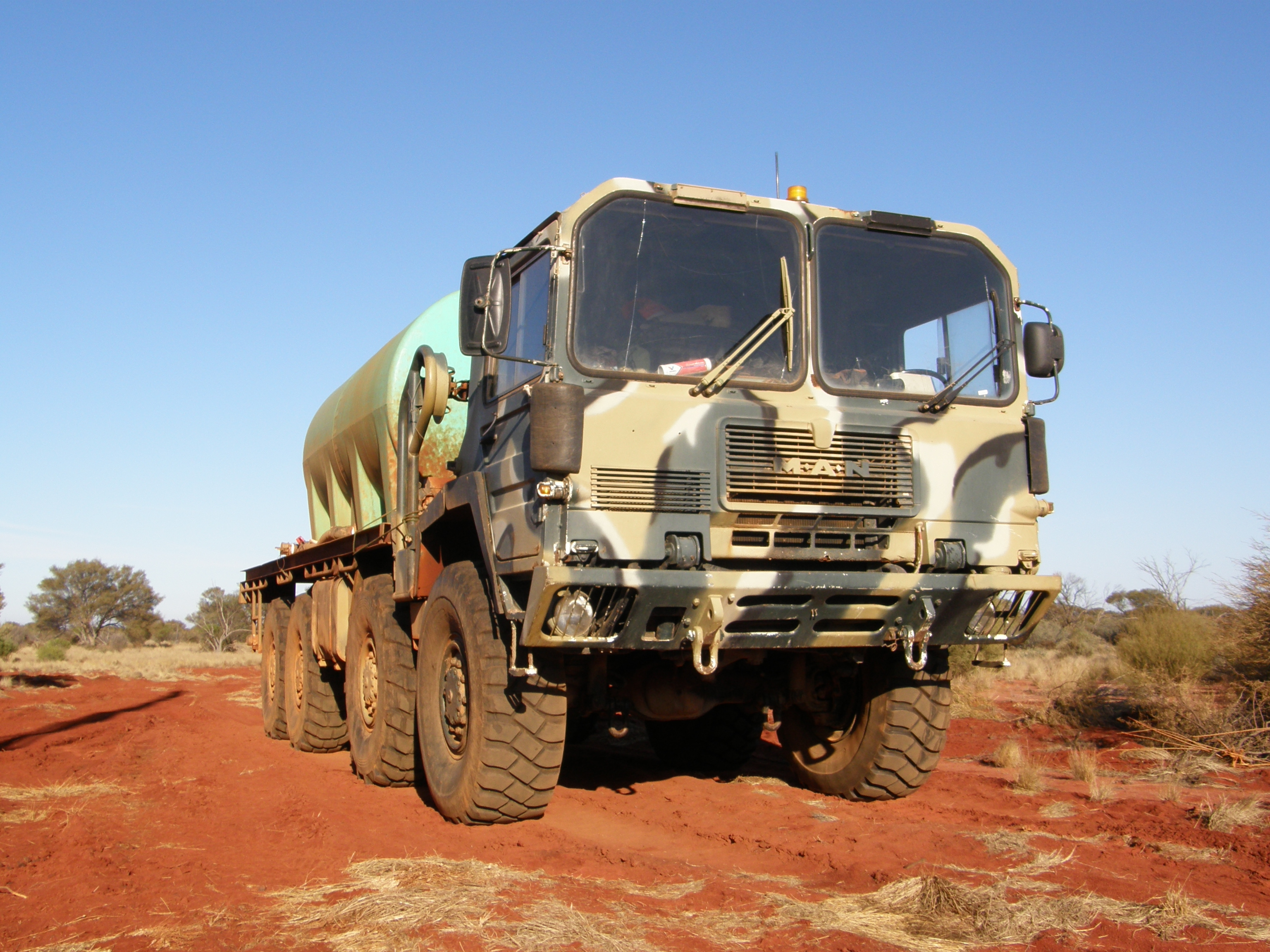 MAN M-1014 KAT 2 als Wasser-LKW in der Kohlerkundung suedlich Coober Pedy, South Australia